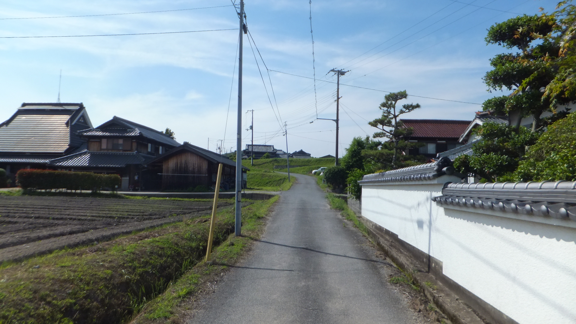 兵庫県三木市口吉川町久次